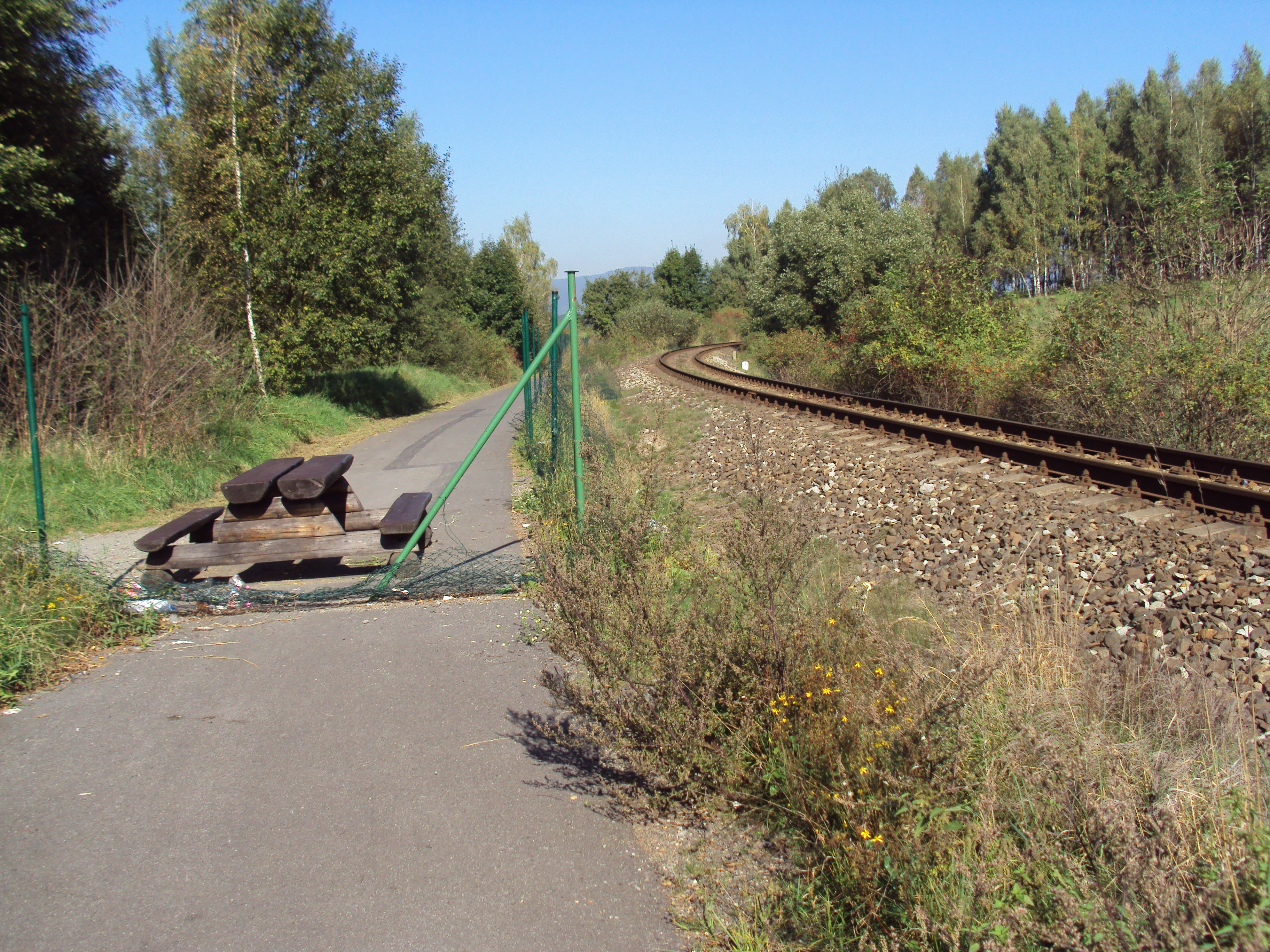 Začíná 300 metrů na sever od České Lípy, vlevo cyklostezka, vpravo trať 080 na Rumburk